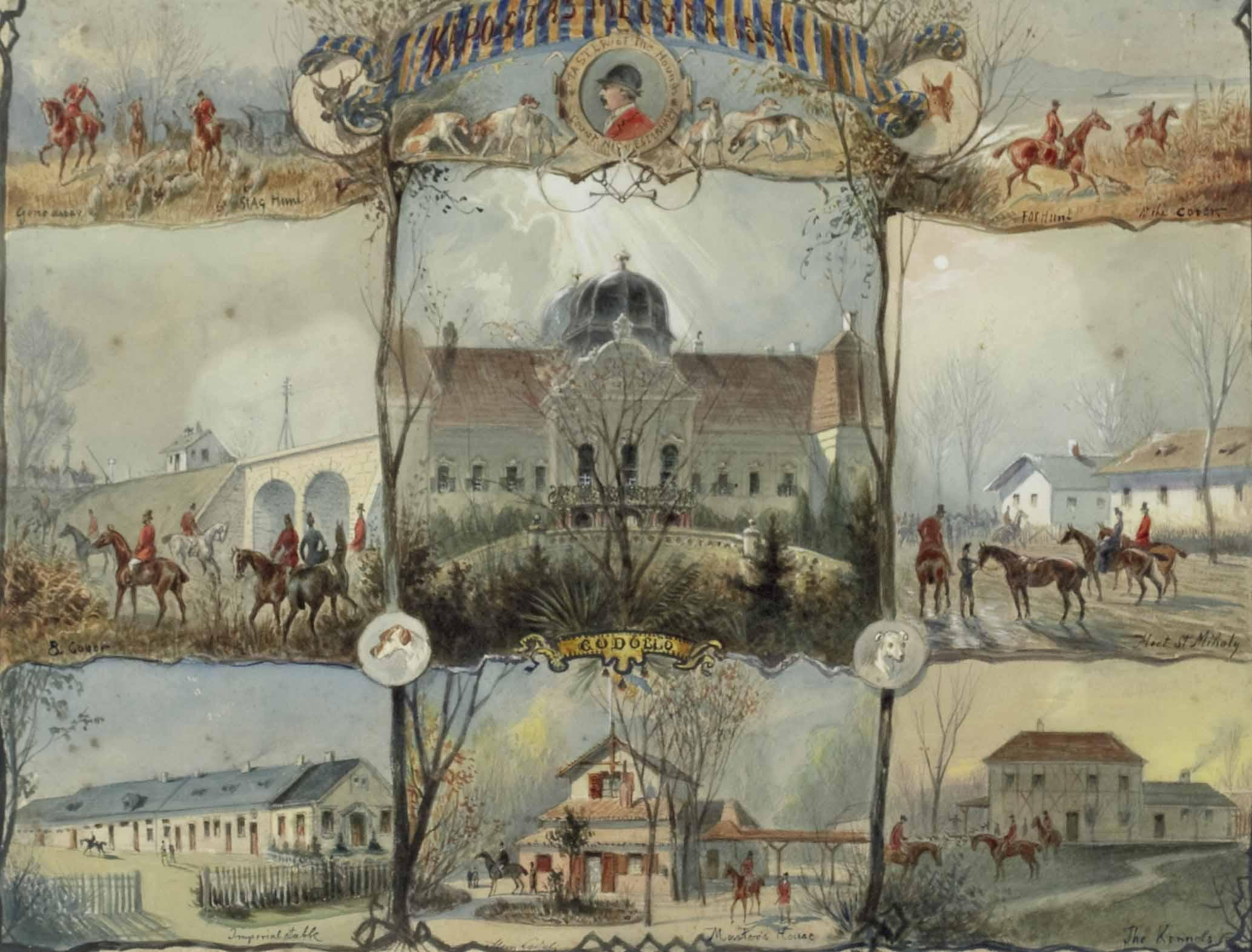 Jagdbild für Schloss Gödöllö bei Budapest